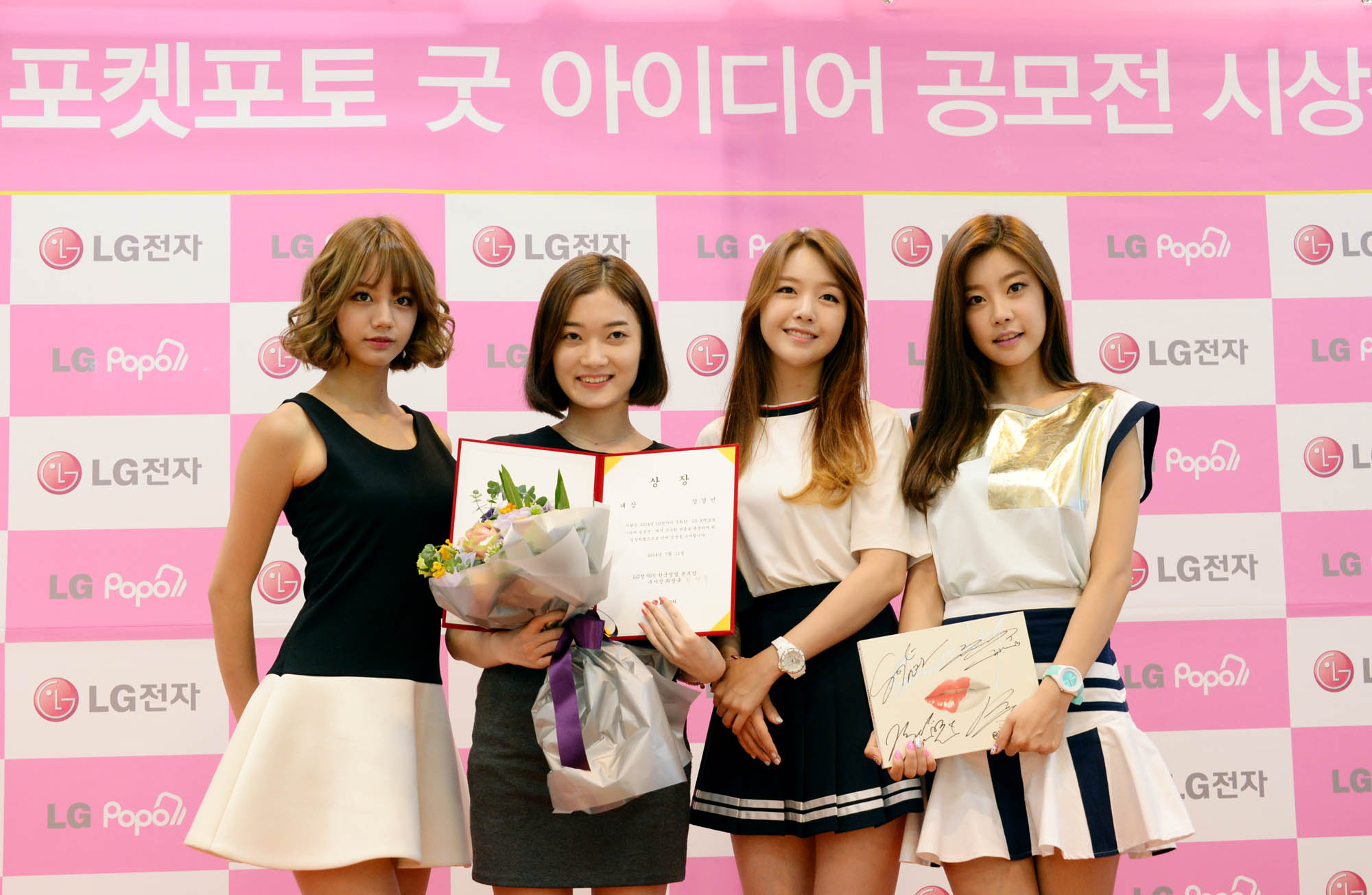 ■ 11일, LG베스트샵 강남본점서 걸스데이 초청해 시상식 진행 ■ 공모 기간 중 아이디어 약 2천 2백건 등록, 조회수 6만건 등 폭발적 인기 ■ 대상, 최우수상 등 우수작 10편 선정 ※ Social LG전자 ( 에서 관련 보도자료를 확인하실 수 있습니다.